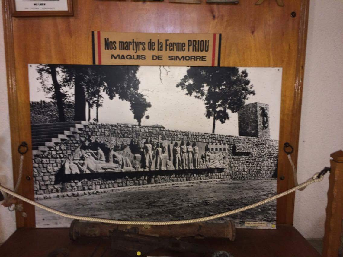 Photographie prise au musée de la Résistance à Auch (32), dans la partie consacrée au maquis de Meilhan.